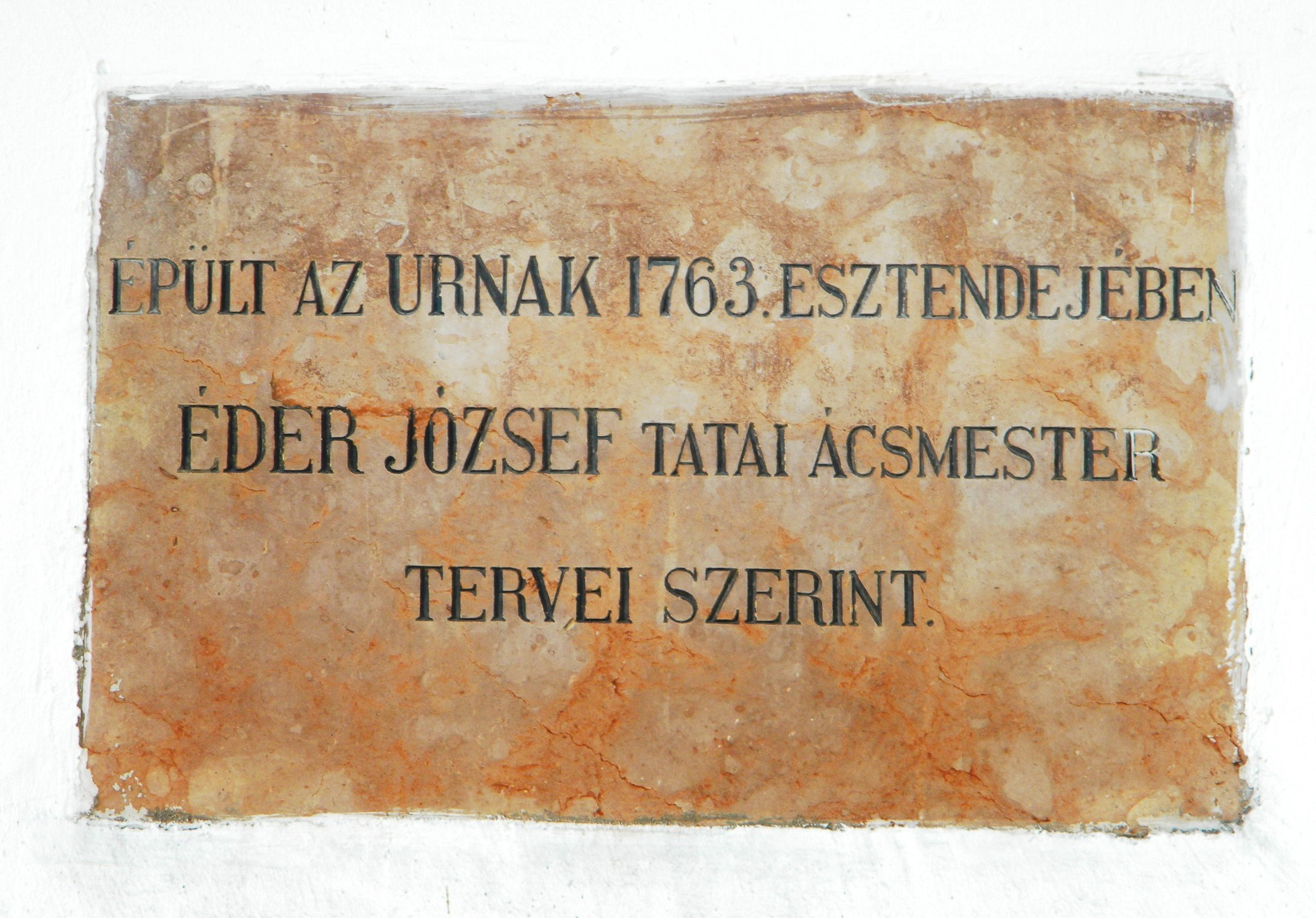 Az Óratorony (Harangláb) Magyarországon, Tatán található az Országgyűlés téren. Az emléktábla Éder József, a Harangláb építőjének állít emléket. A képre vonatkozó szócikk